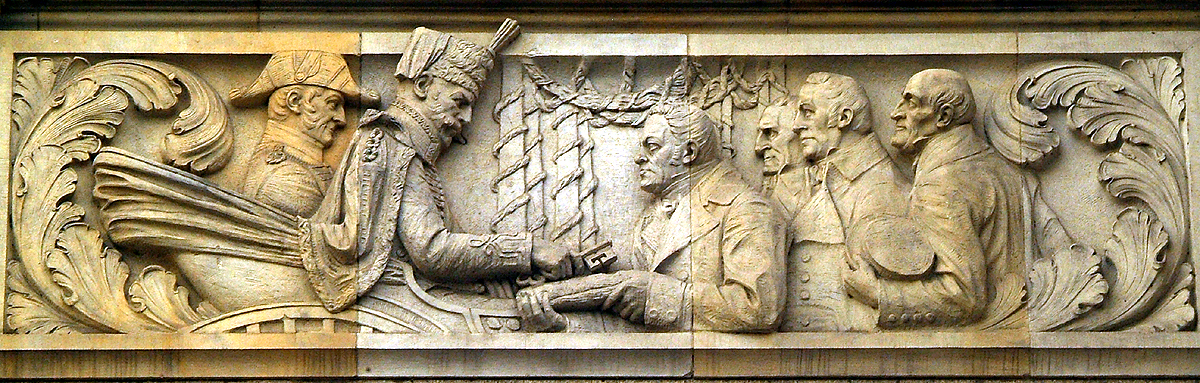 Nach dem Ende der Personalunion zwischen Großbritannien und Hannover zog König Ernst August I. 1837 mit großem Gefolge in sein Königreich auf dem europäischen Kontinent ein; der hannoversche Stadtdirektor überreichte dem König symbolisch die Schlüssel der Residenzstadt Hannover. als Teil des halbplastischen Geschichts- oder auch "Bilderfrieses" am Neuen Rathaus in Hannover verewigte der Bildhauer August Waterbeck das Thema. Wilhelm Rothert benannte in seinem Werk Allgemeine Hannoversche Biographie, Band 2: Im Alten Königreich Hannover 1814–1866, Hannover: Adolf Sponholtz Verlag, 1914 unter der Abbildung auf Seite 128 teilweise die Namen der Dargestellten (von links nach rechts): Oberstleutnant v. Linsingen König Ernst August Stadtdirektor Wilhelm Rumann Bürgervorsteher (ohne Namensangabe) Bürgerworthalter Hausmann Bürgervorsteher (ohne Namensangabe) ...